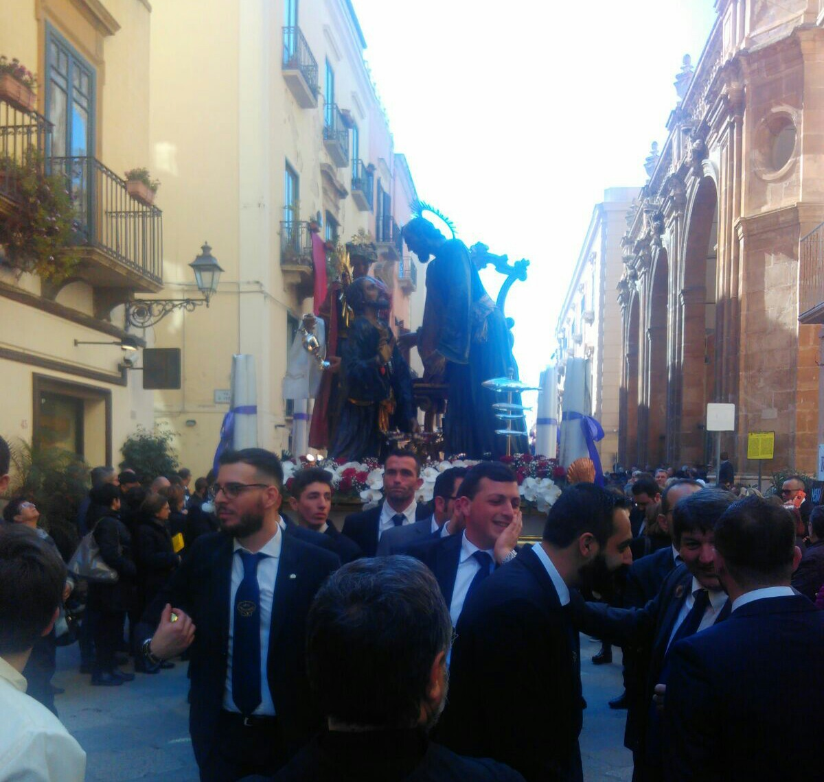 Processione dei Misteri del Venerdì santo. Passaggio nel pomeriggio in corso Vittorio Emanuele, Trapani